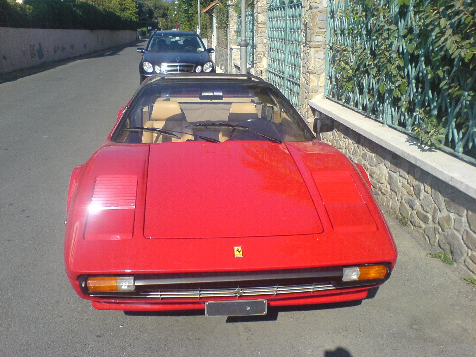 Ferrari 208 GTS (1980)